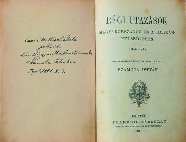 Szamota dedikációja könyvében a Régi utazások Magyarországon és a Balkán-félszigeten című könyvében